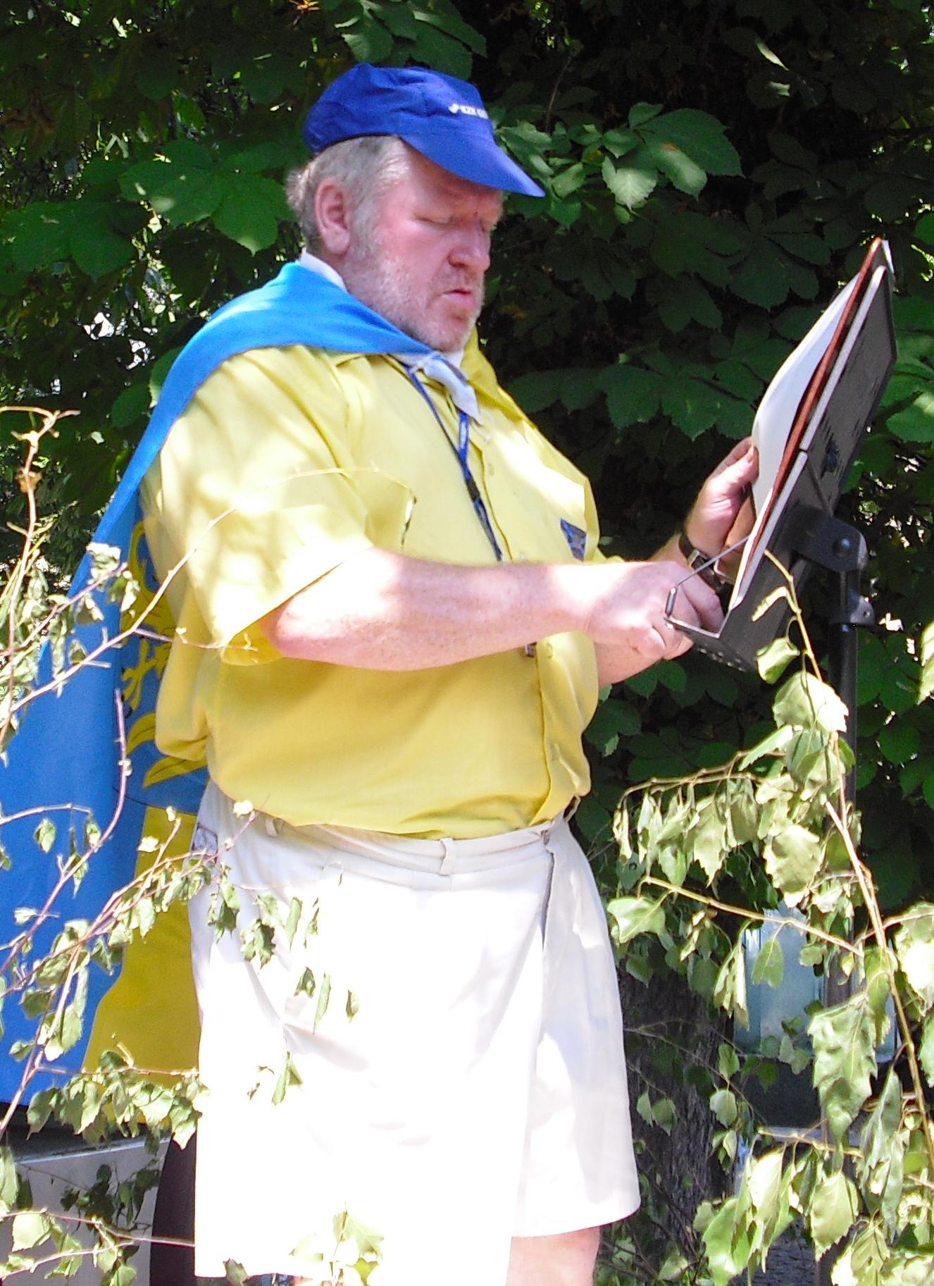 Marian Makula podczas IV Marszu Autonomii